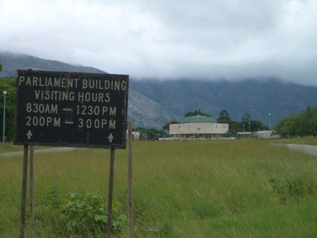 Parliament Building of the Kingdom of Swaziland in Lobomba/Swaziland